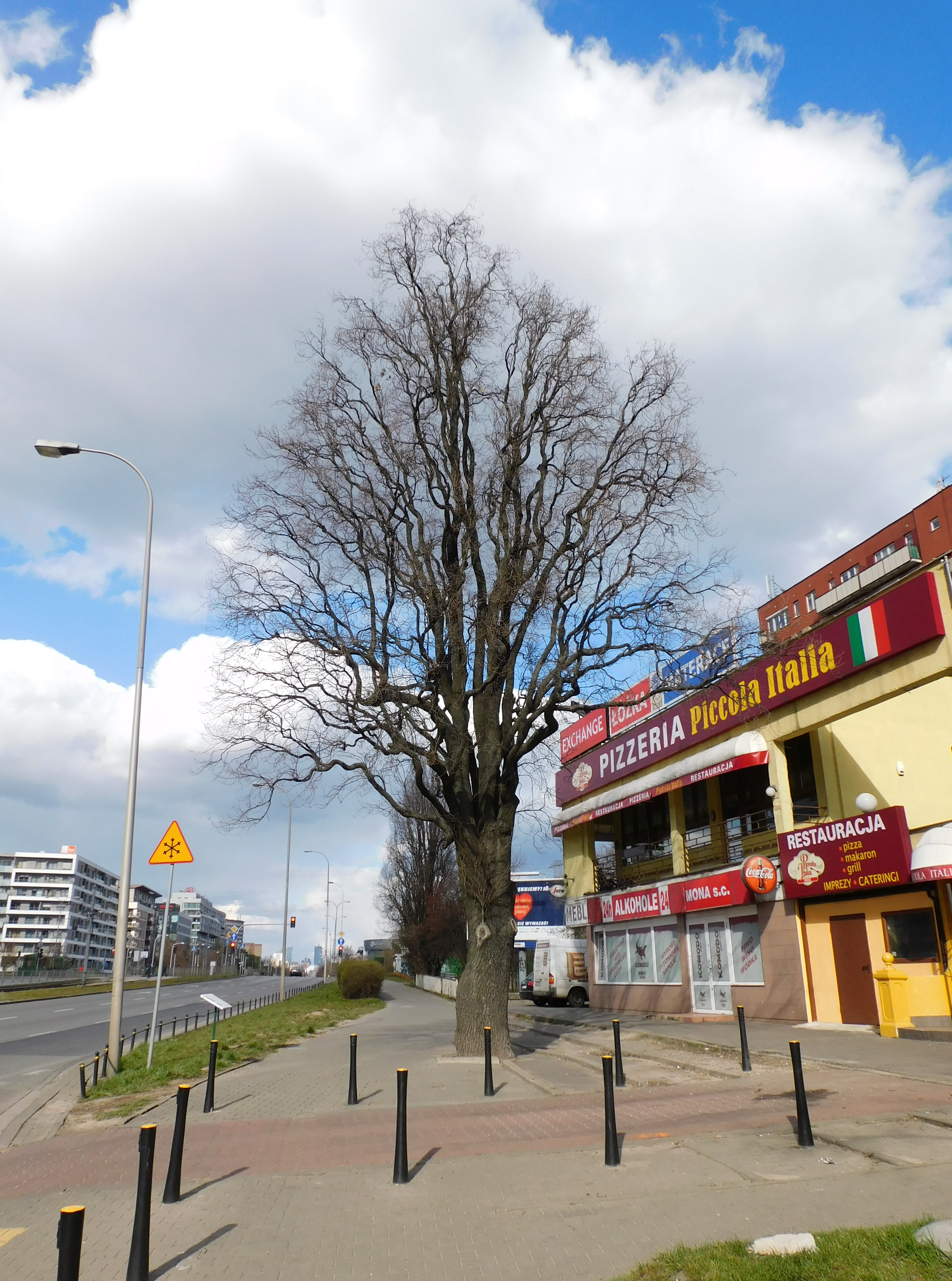 Dom piramidalny ze szkółki Hoserów na warszawskim Rakowcu